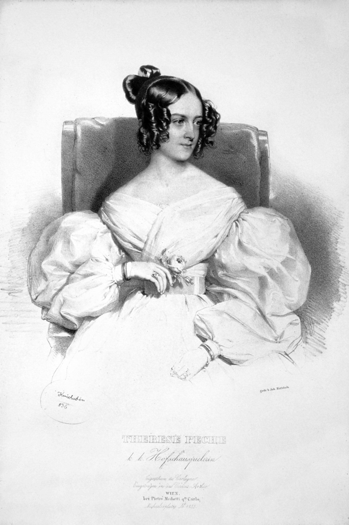 Therese Peche (1806-1882), österreichische 'Schauspielerin Lithographie von Josef Kriehuber, 1836